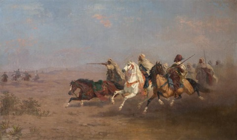 L'ESCARMOUCHE THE SKIRMISH